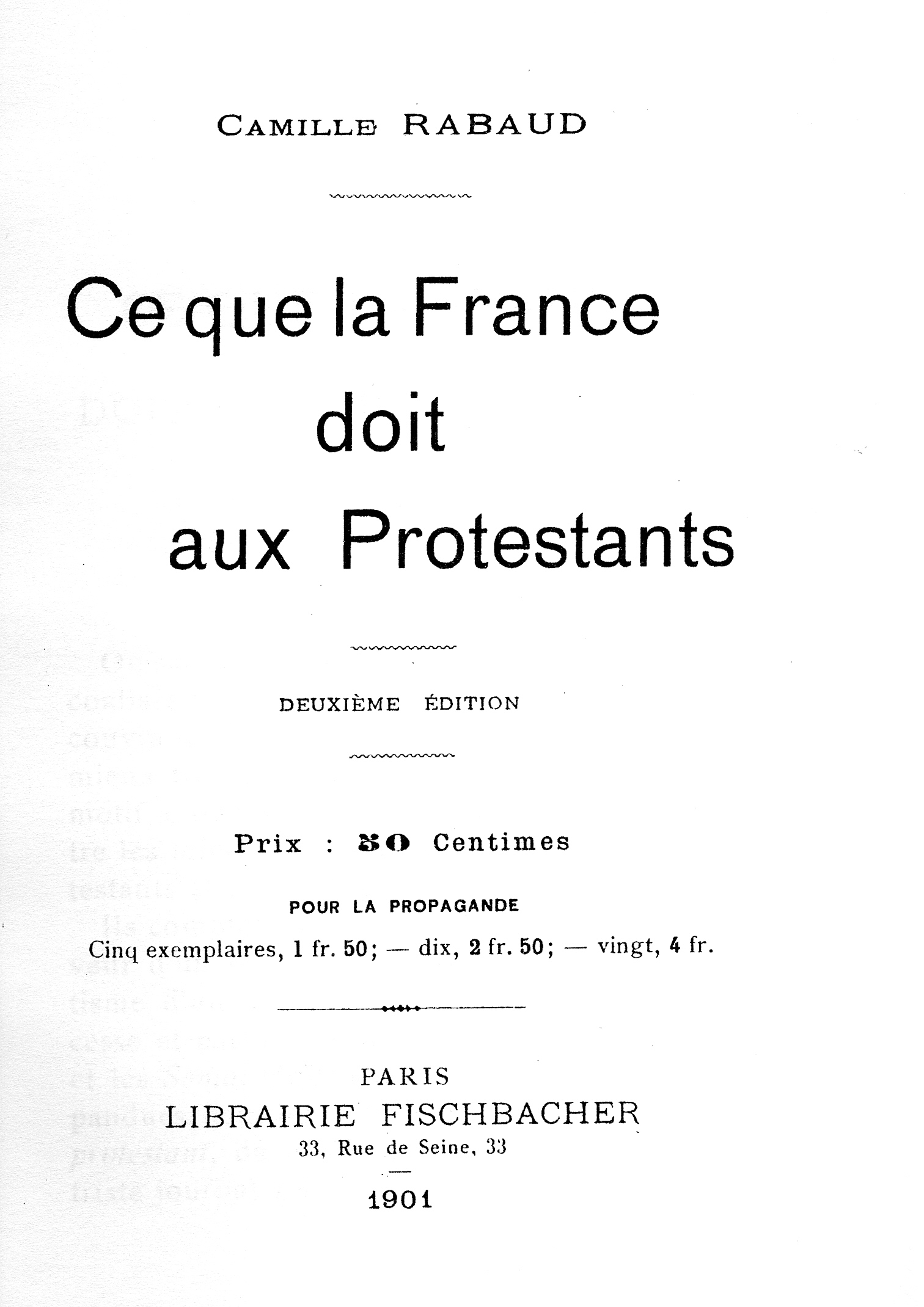 Aragonés: Ce que la France doit aux Protestants – Fischbacher - 1901.